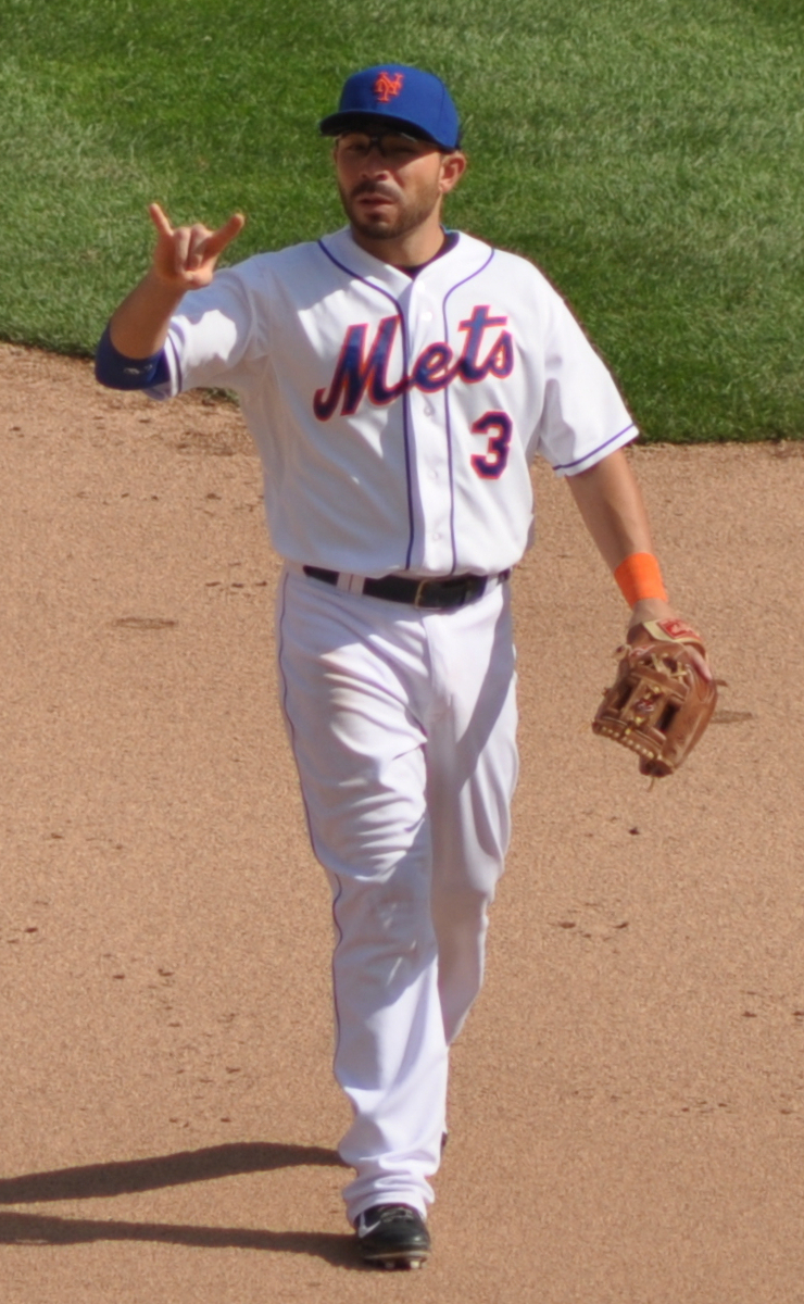 Omar Quintanilla